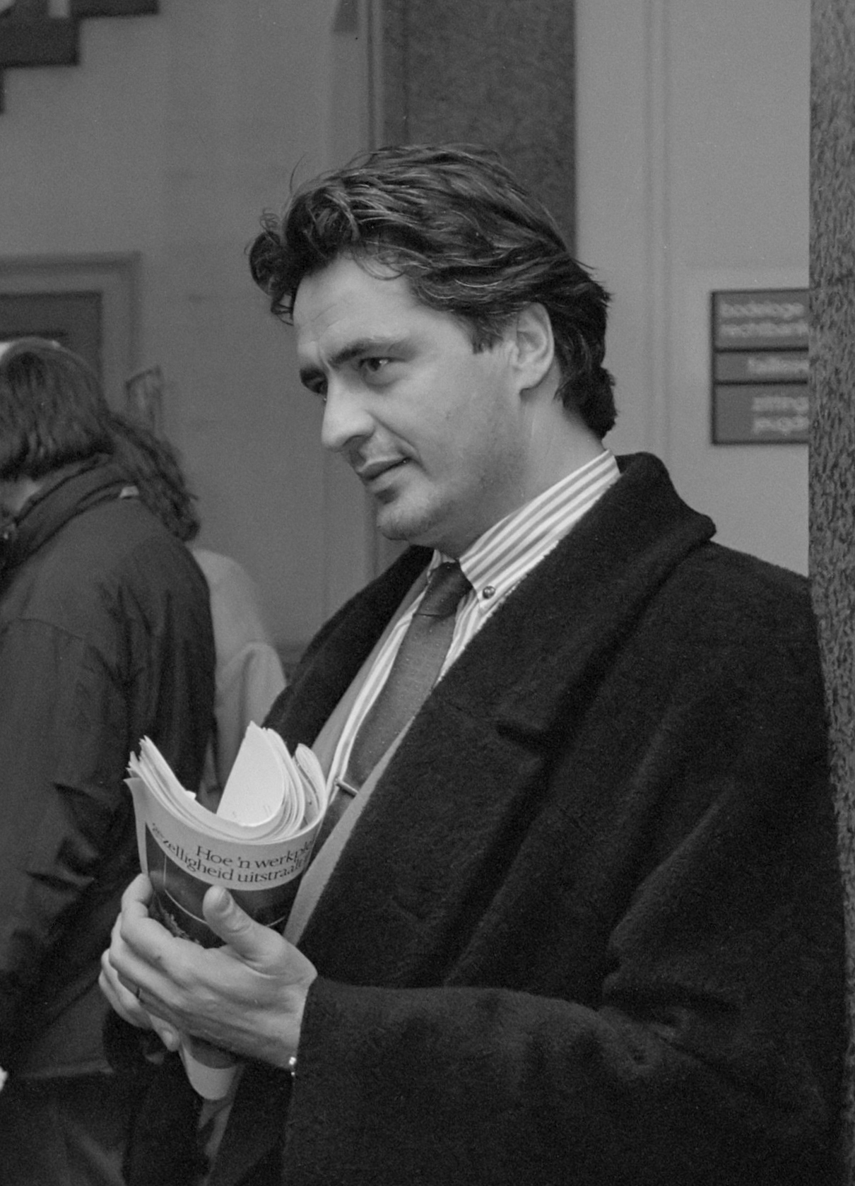 Kort geding van wethouder P. Stuart van Bergen op Zoom tegen het weekblad Nieuwe Revu. Van links naar rechts advocaat mr. Boukema met hoofdredacteur Derk Sauer en journalist Storms 25 januari 1989